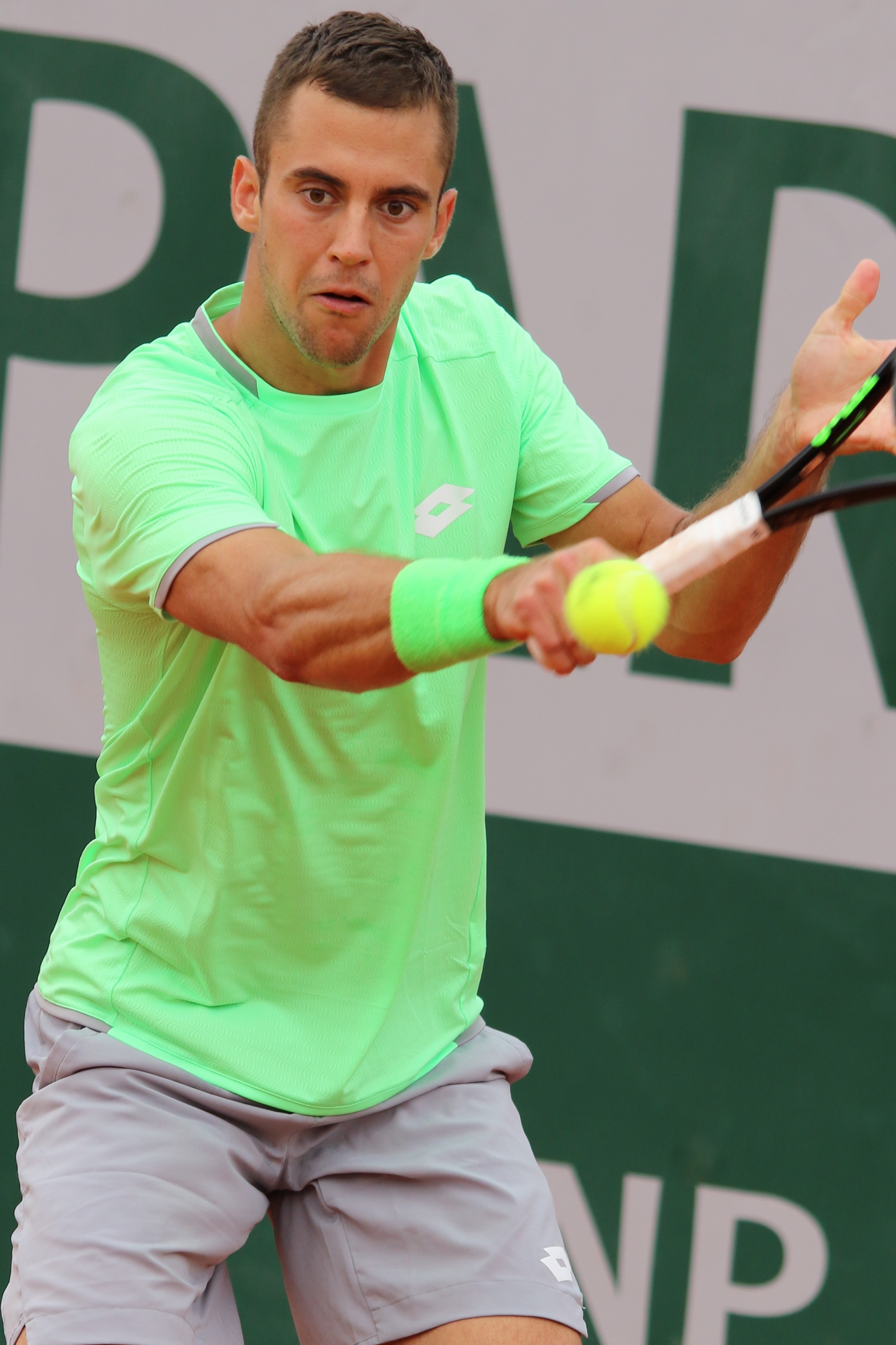 Djere RG19 (34)